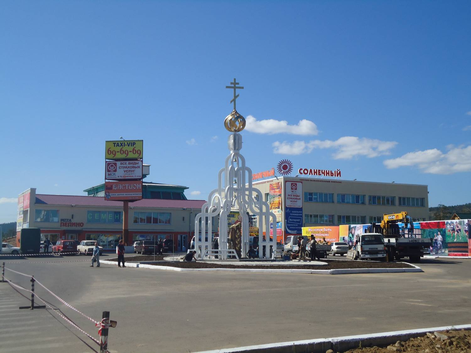 Мемориал "Часовня" на площади около ТРК "Солнечный". Центр Восточного